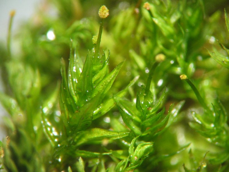 Streifensternmoos Aulacomnium androgynum, Habitus, Vergrößerung: 15x, Rostock